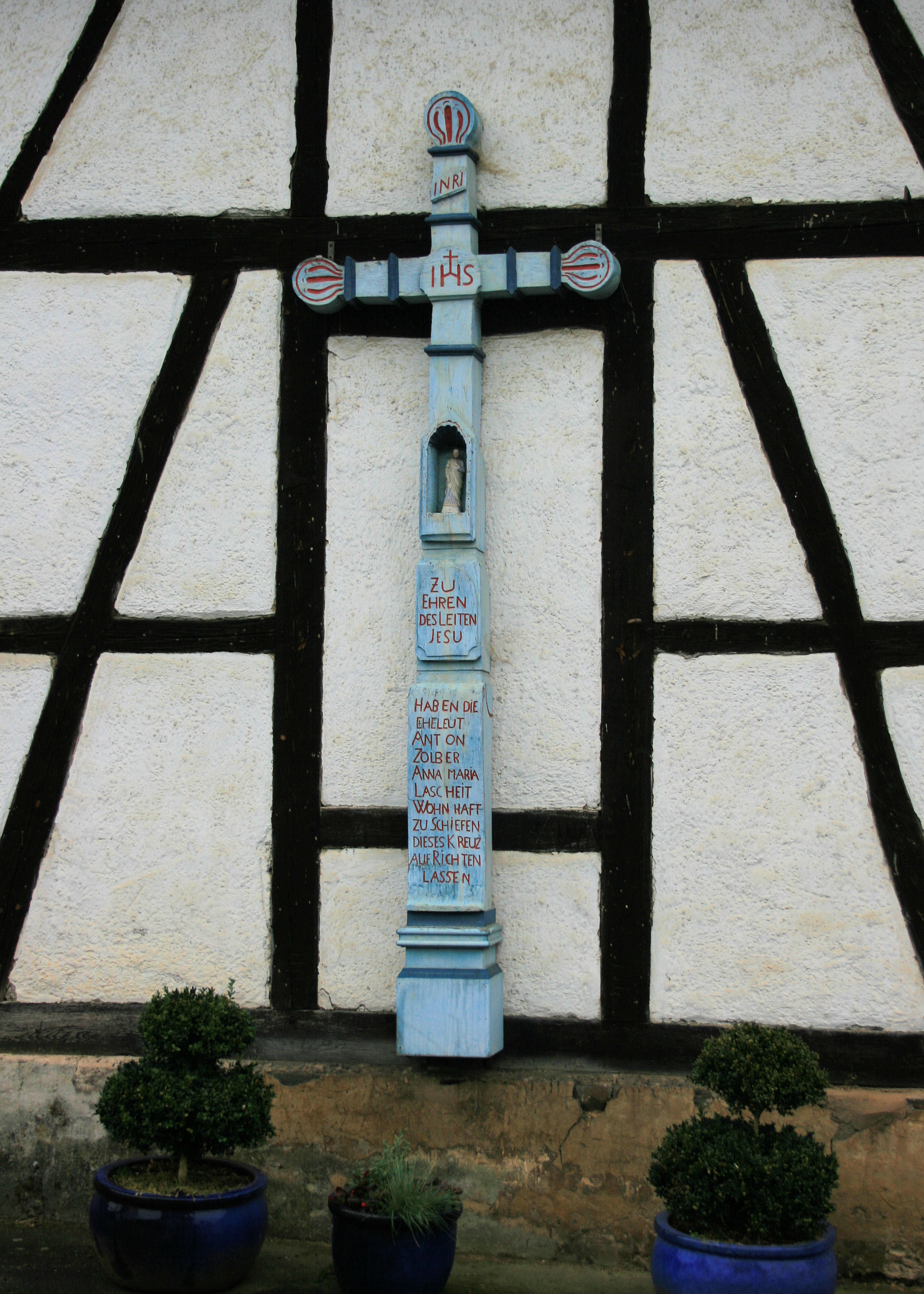 Wegekreuz Eitorf, Alzenbacher Straße